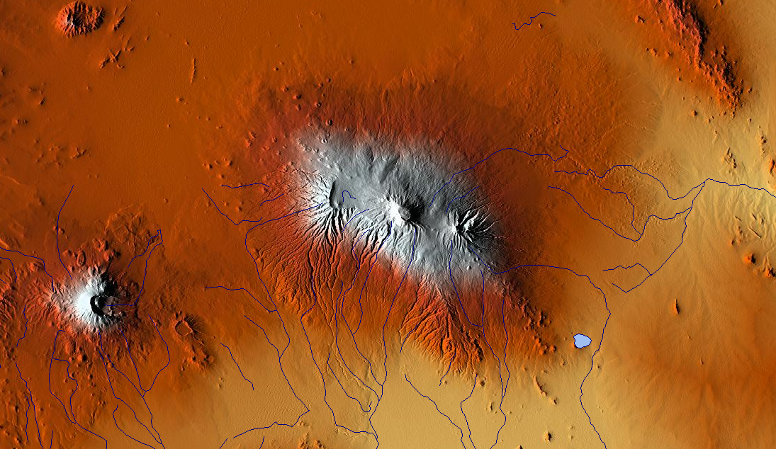 Relief of Kilimanjaro